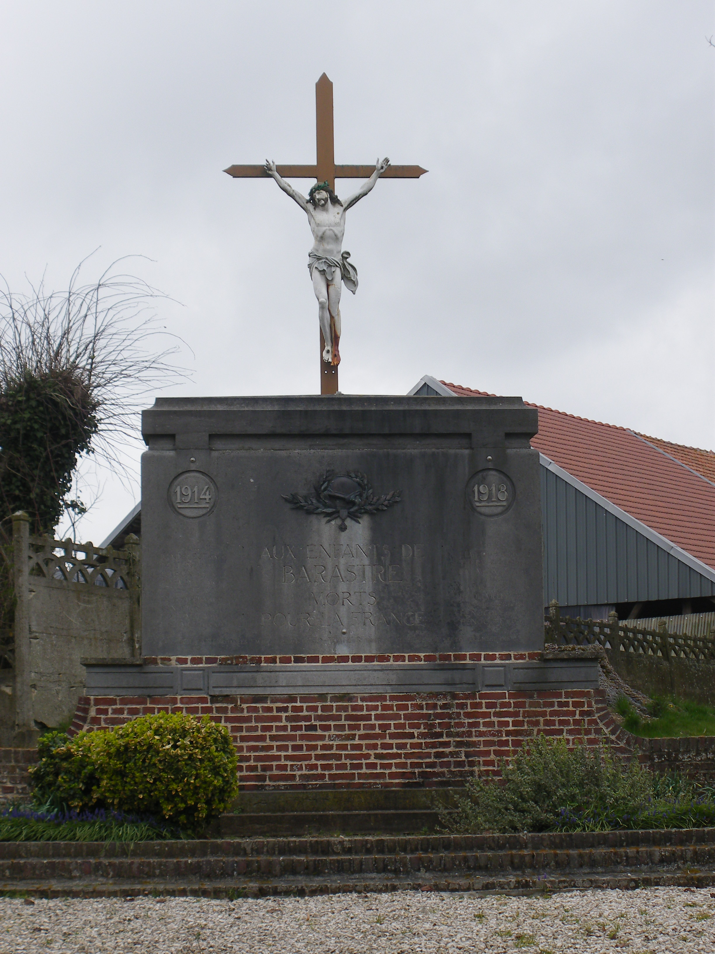 Vue d'un calvaire, monument aux morts de la commune de Barastre.